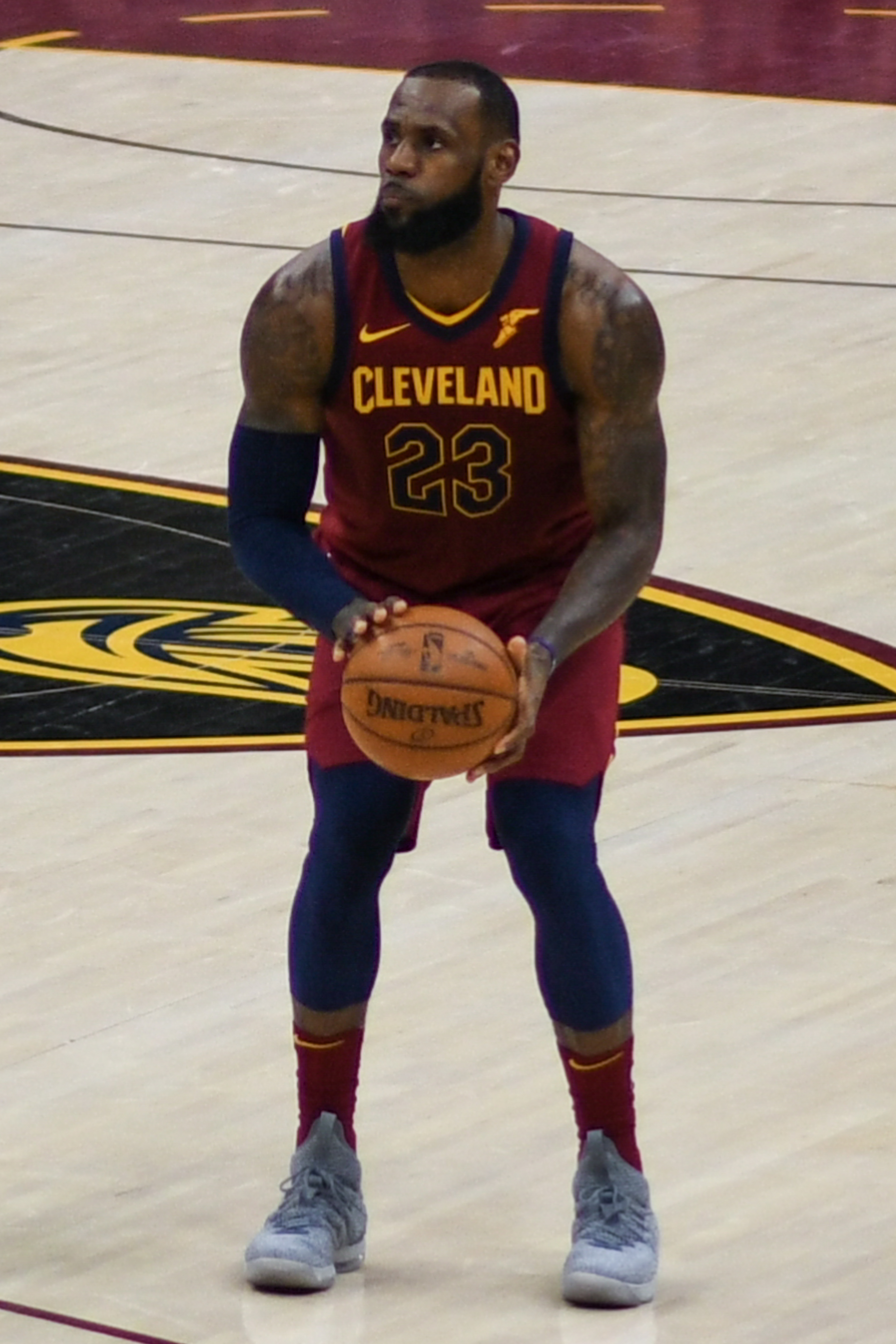 LeBron James